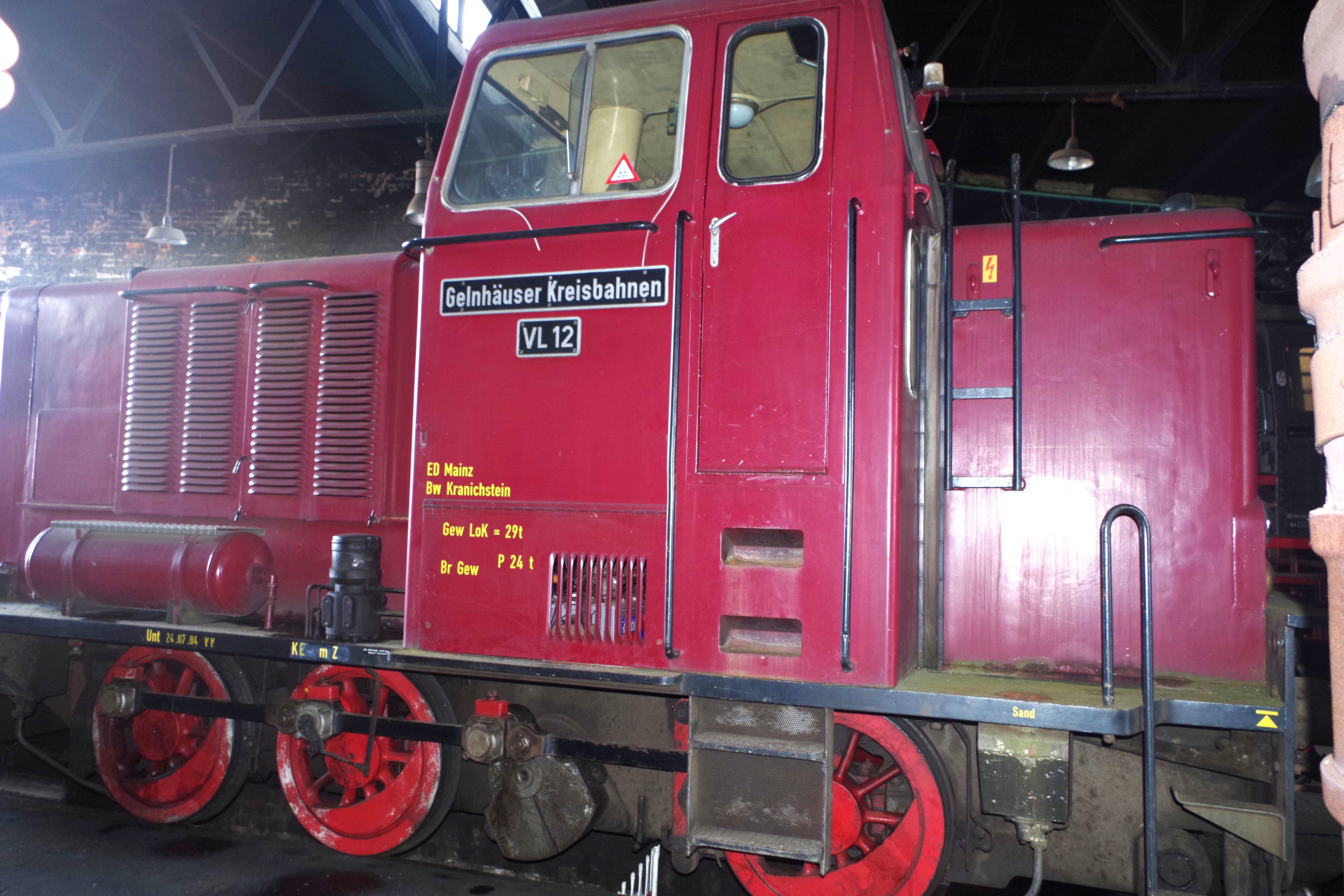 Lok VL12 der Gelnhäuser Kreisbahnen im Museum Kranichstein